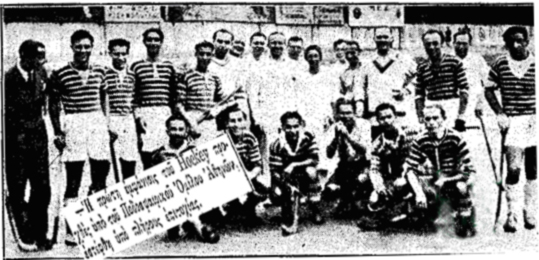 Η ομάδα χόκεϊ επί χόρτου του Παναθηναϊκού το 1930